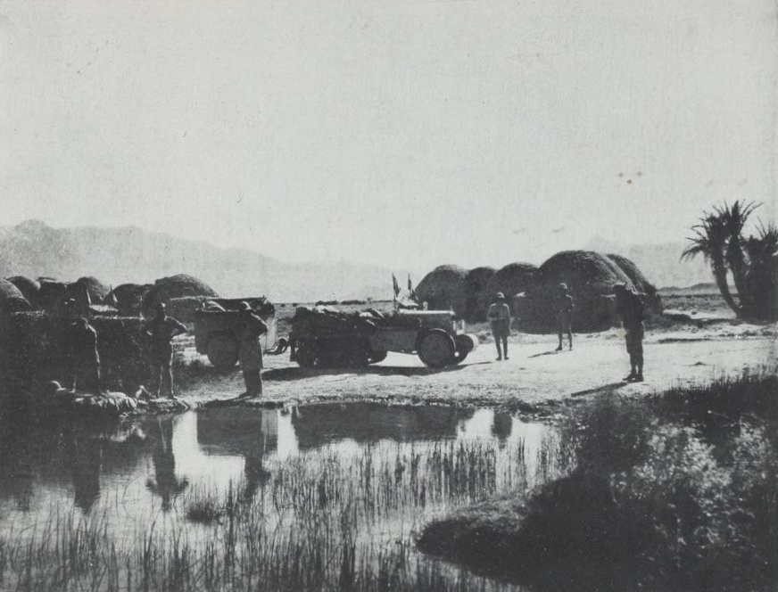 Photographie publiée dans le numéro de décembre de la revue La Géographie à l'occasion de divers compte-rendus de l'expédition. Sous-titre : Entre Farah et Girisk en Afghanistan. Expédition Centre-Asie Citroën (1931-1932).